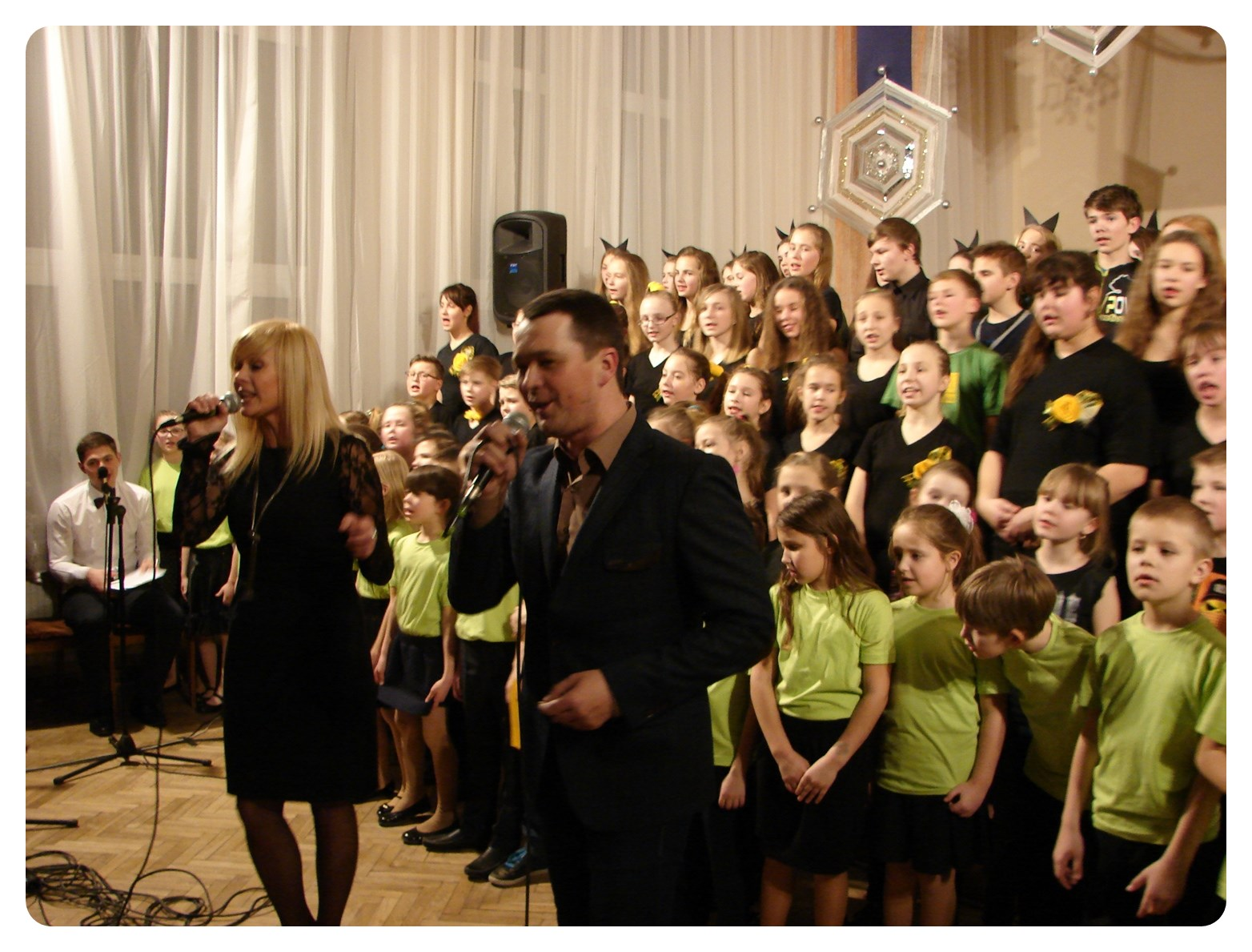 Koru Kari 2016